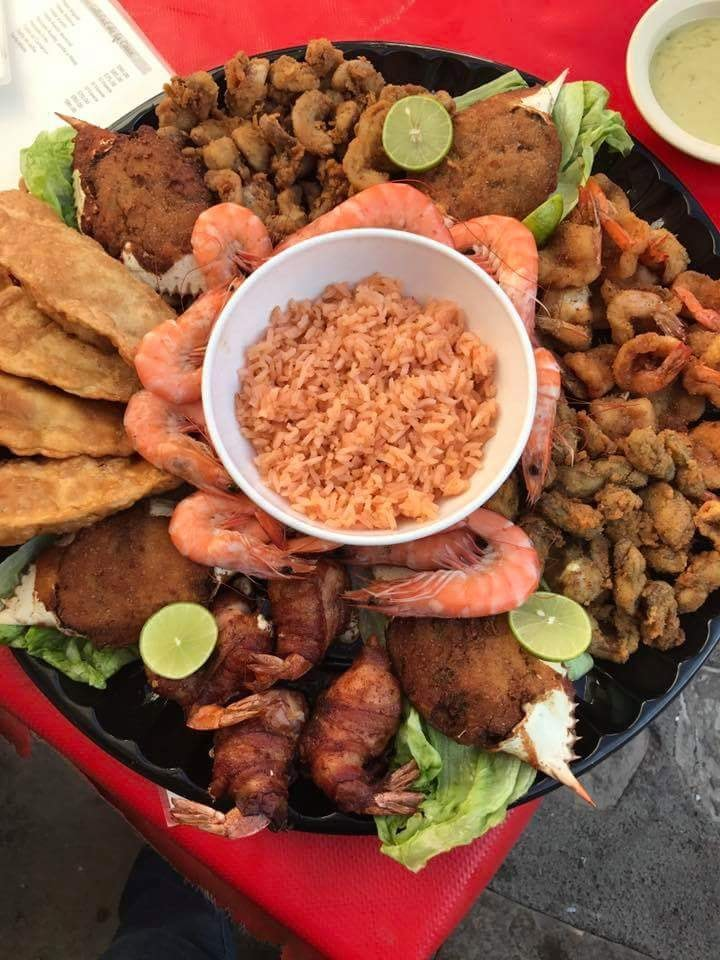 Se puede ver parte de los alimentos que se consumen en la región.